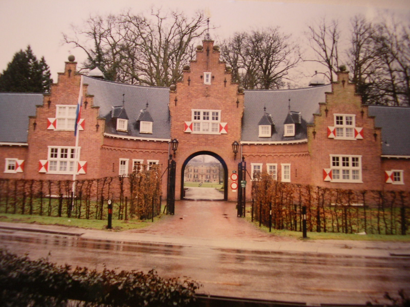 Eigen gemaakte foto van het poortgebouw van Huis Doorn